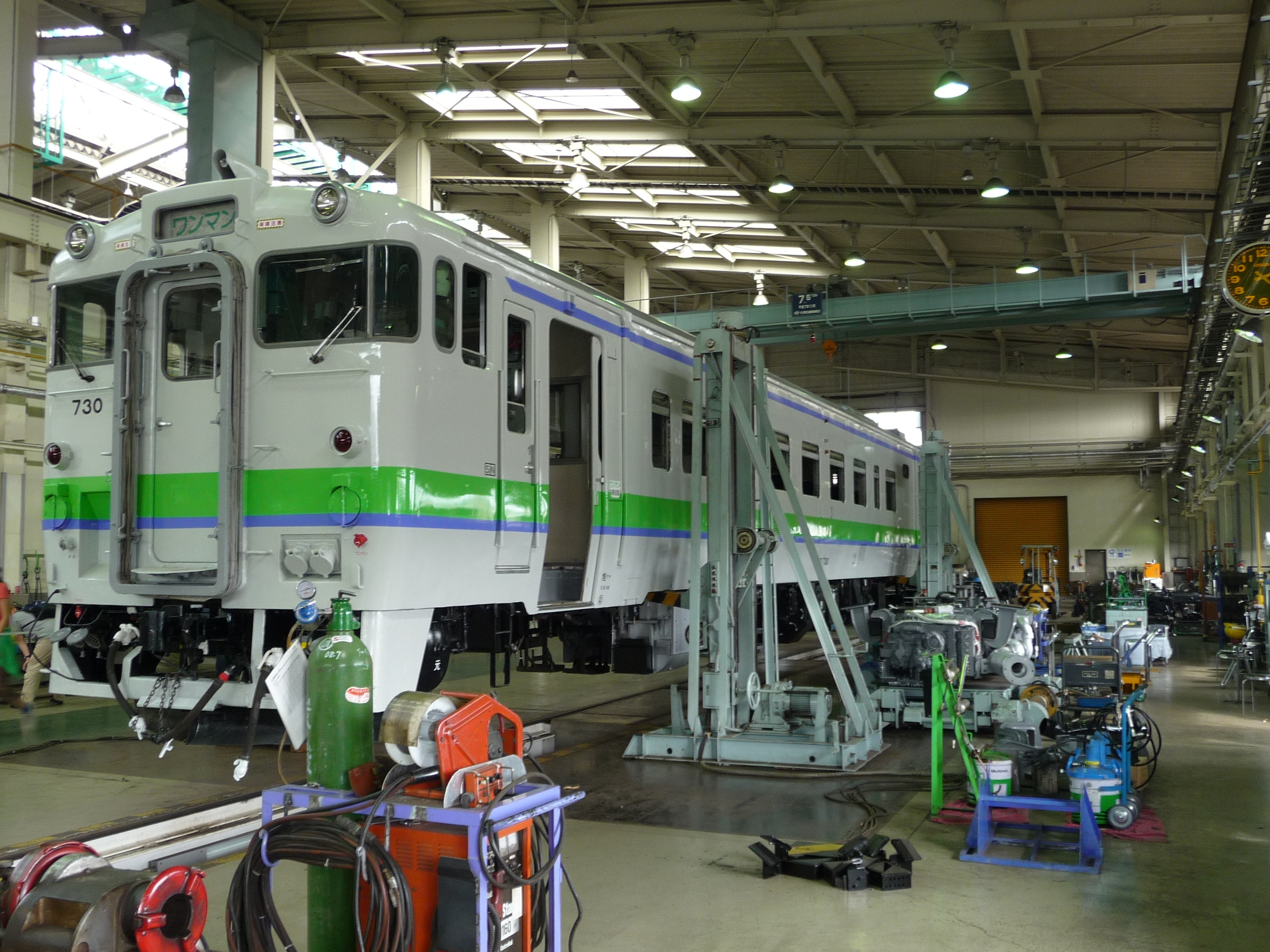 釧路運輸車両所で検査中のJR北海道キハ40形気動車（キハ40 730、旭川運転所所属）釧路運輸車両所の一般公開で撮影